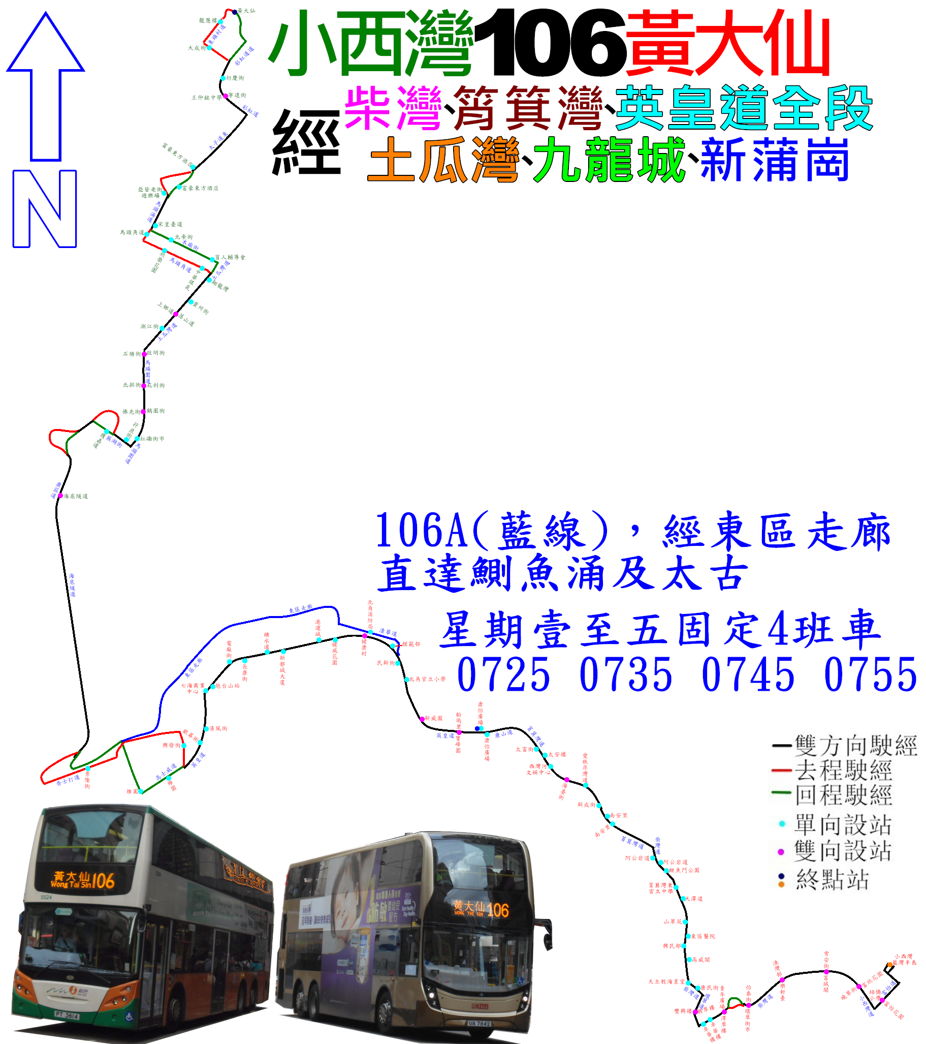 中文（香港）: 過海隧巴106線的走線圖